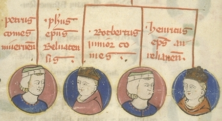 Toulouse, Bibliothèque municipale MS 450: Bernard Gui, De origine prima Francorum f 190v